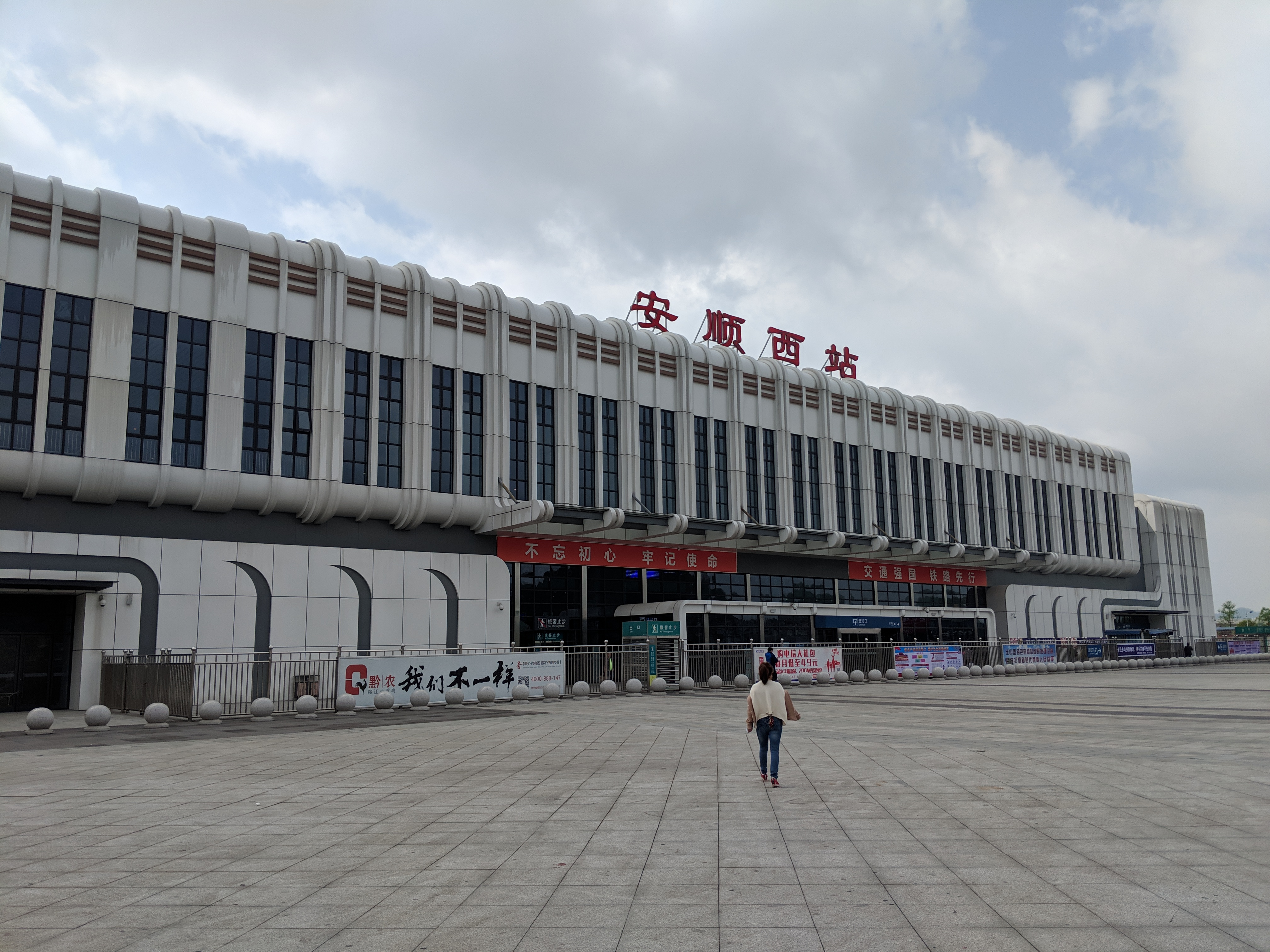 中文（中国大陆）: 安顺西站主建筑